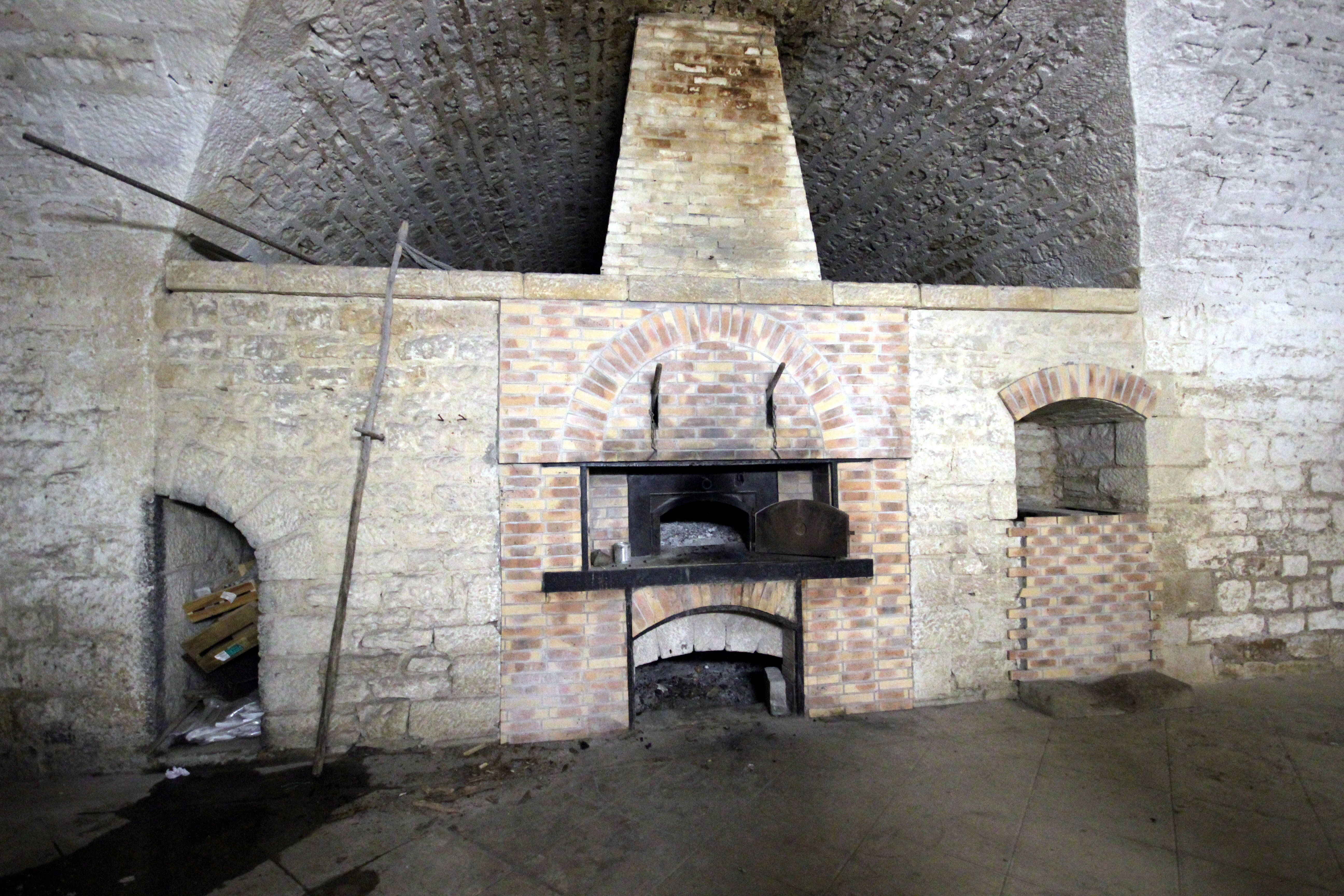 La boulangerie et son four à pain en bon état de fonctionnement du fort de cognelot